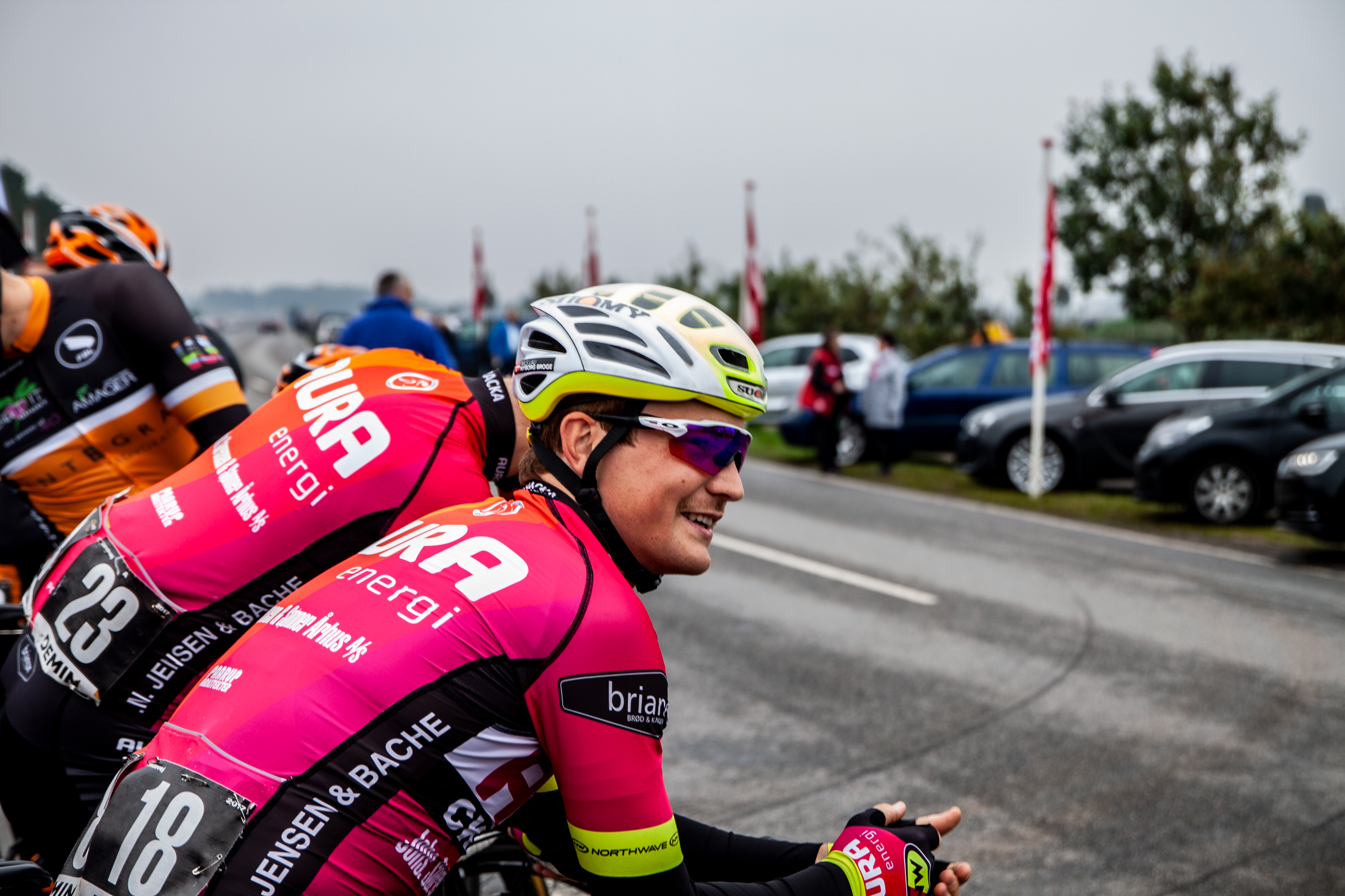 Ryttere fra Team AURA Energi-CK Aarhus i 2017